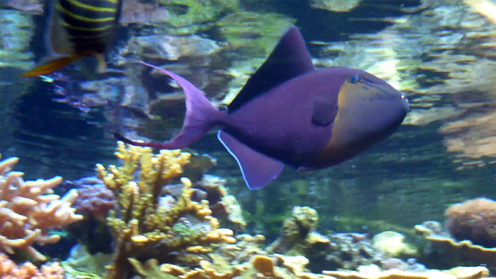 Odonus niger